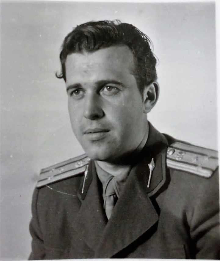 Pplk. Jiří Mastný